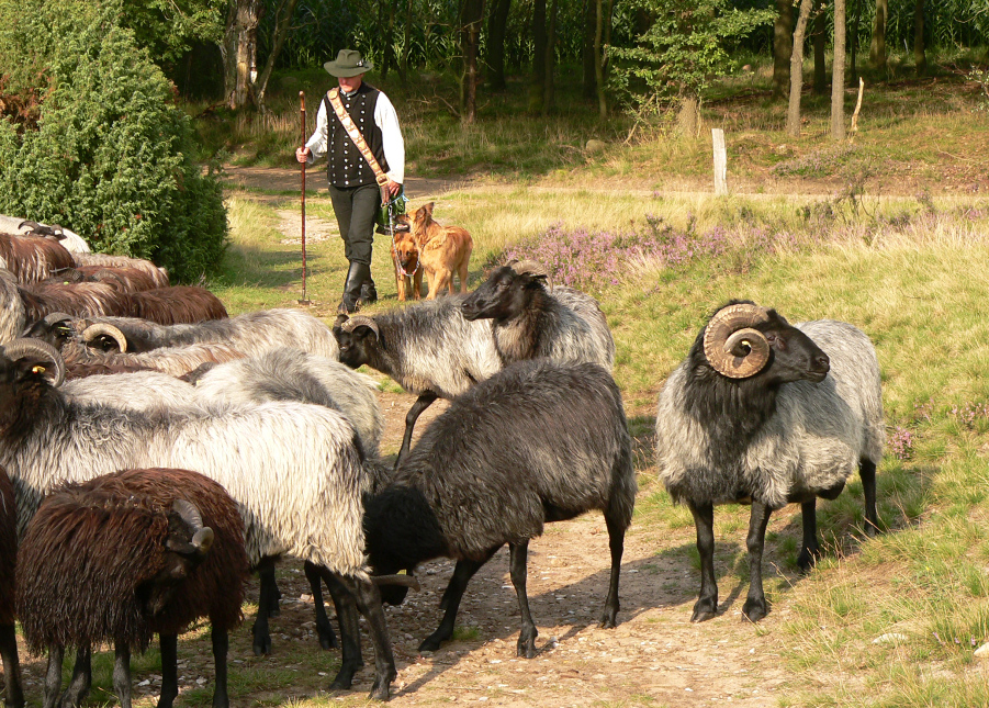 Heidschnuckenherde bei Oberhaverbeck